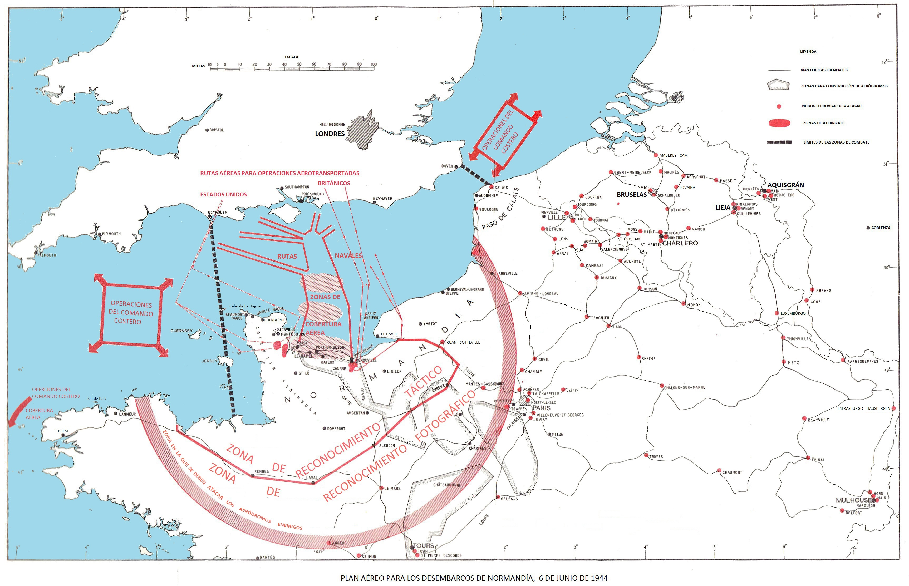 Plan aéreo de los Aliados para el desembarco de Normandía, junio de 1944